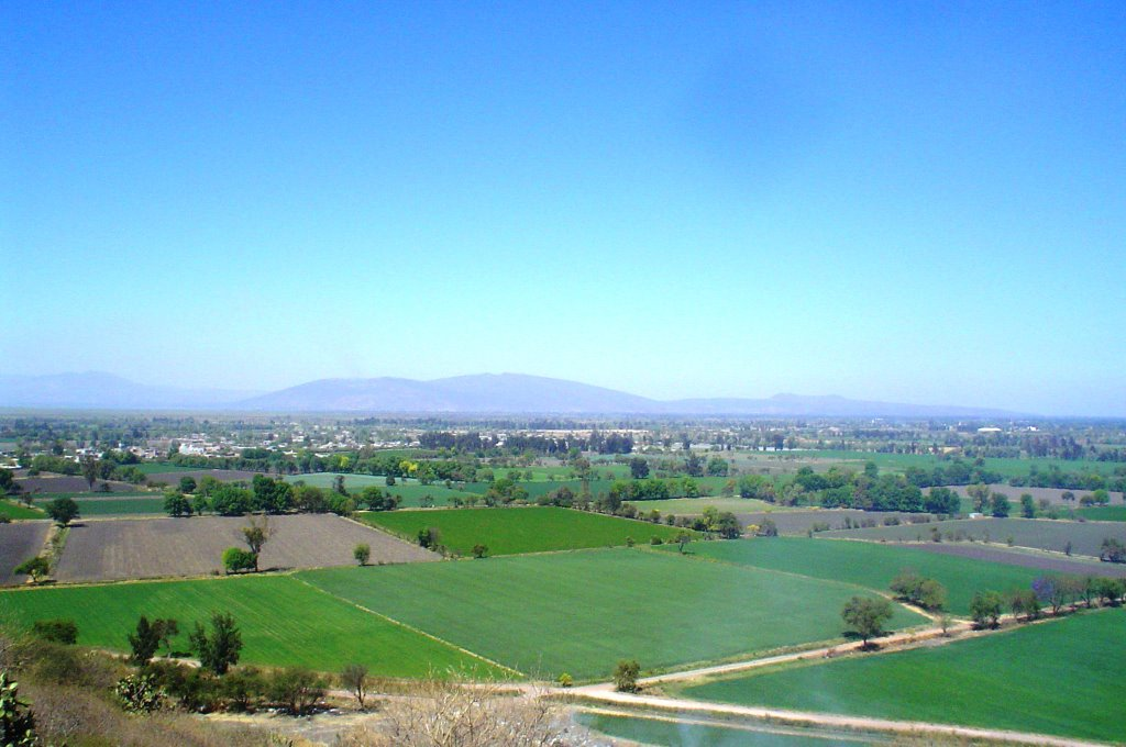 Parcelas Cupareo